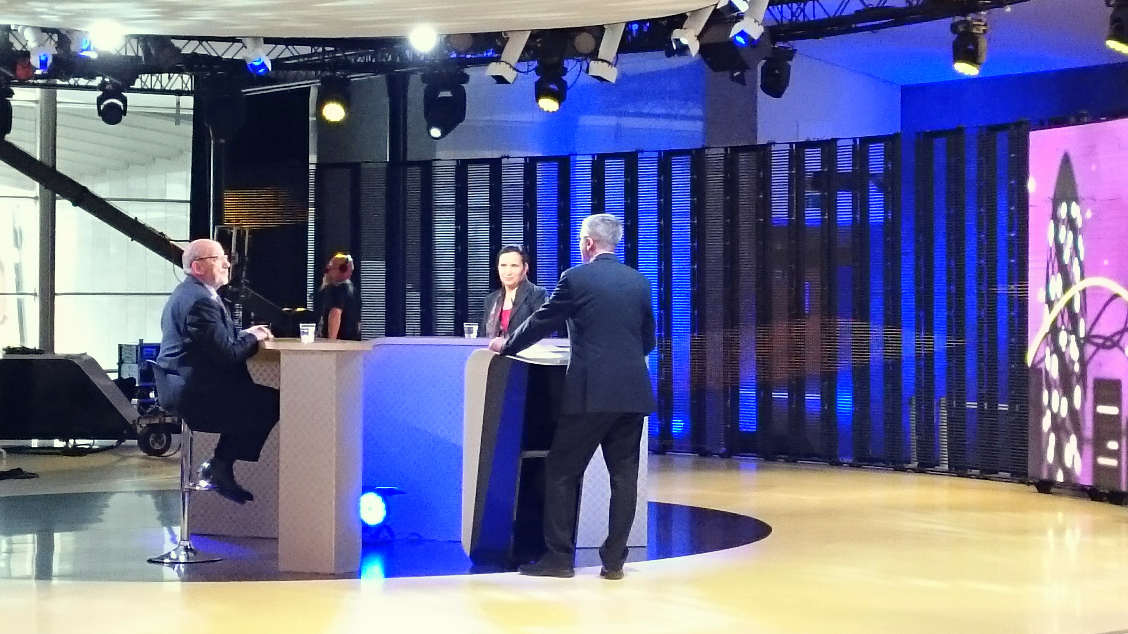 L'émission Le Bar de l'Europe sur le plateau du Parlement européen de Bruxelles. Émission diffusée sur TV5 Monde, en 2015. En présence de Louis Michel et Salima Ghezali (prix Sakharov 1997).